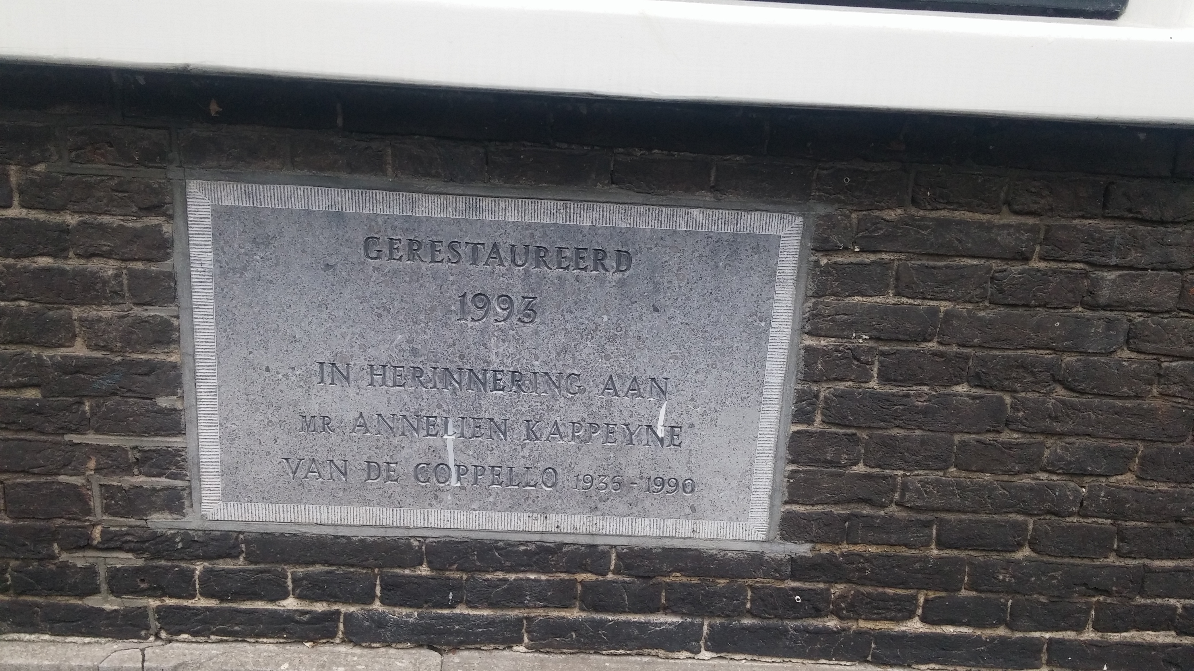 Herdenkingssteen voor Annelien Kappeyne van de Coppello, Gerecht 10, Leiden (Nederland)